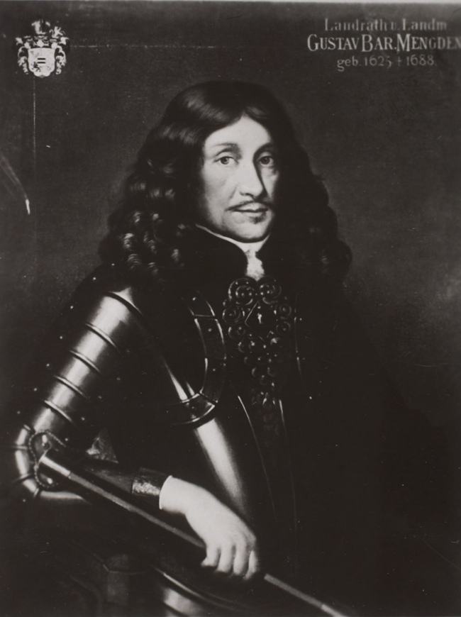 Vabahärra Gustav von Mengden